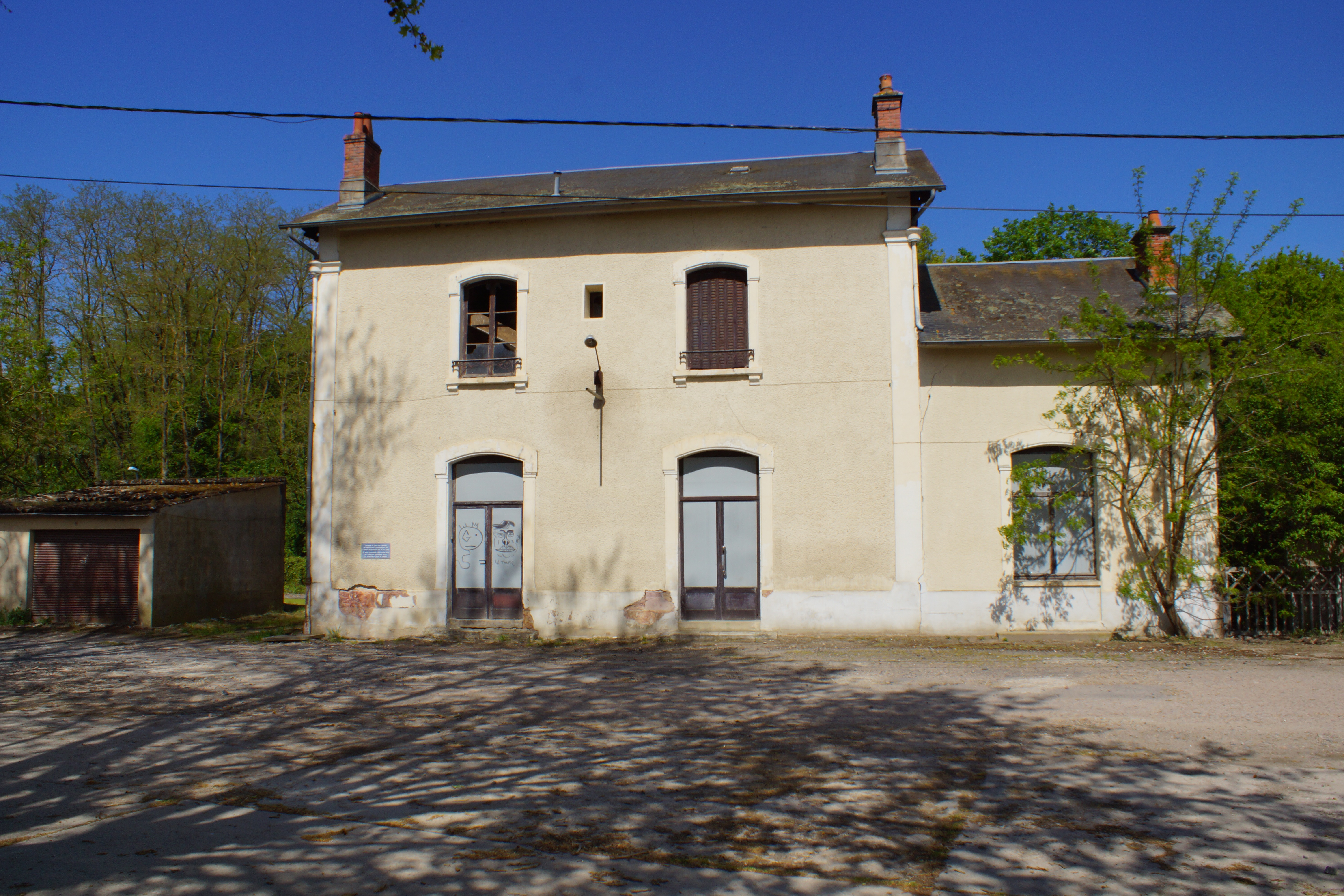 L'ancien bâtiment voyageurs vu de la cours de la gare.